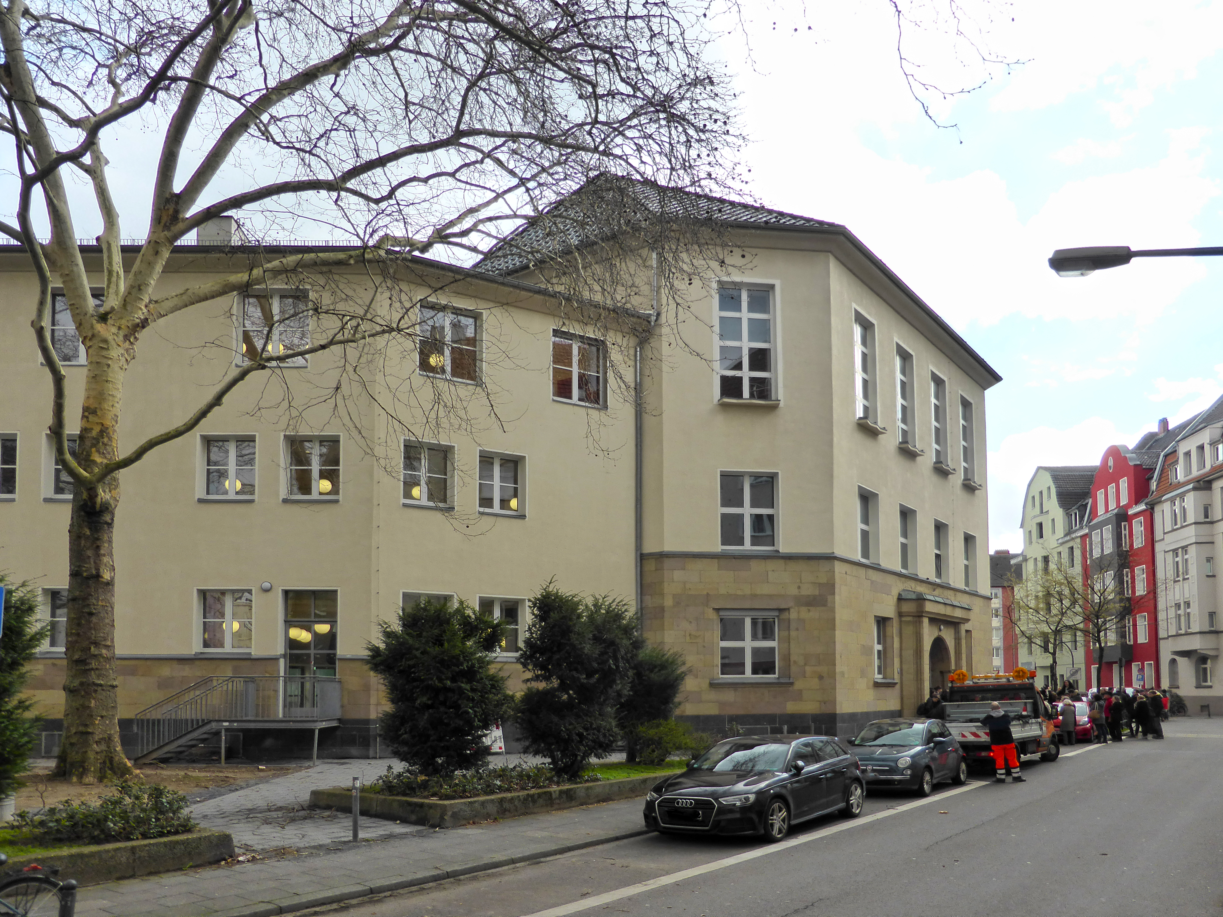 Stolperstein: Stolpersteinverlegung am Deutzer Gymnasium Schaurtestraße, Köln.